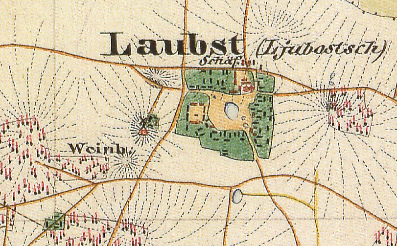 Laubst, Ortsteil der Stadt Drebkau, Lkr. Spree-Neiße, Brandenburg, Ausschnitt aus dem Urmesstischblatt 4351 Drebkau von 1846